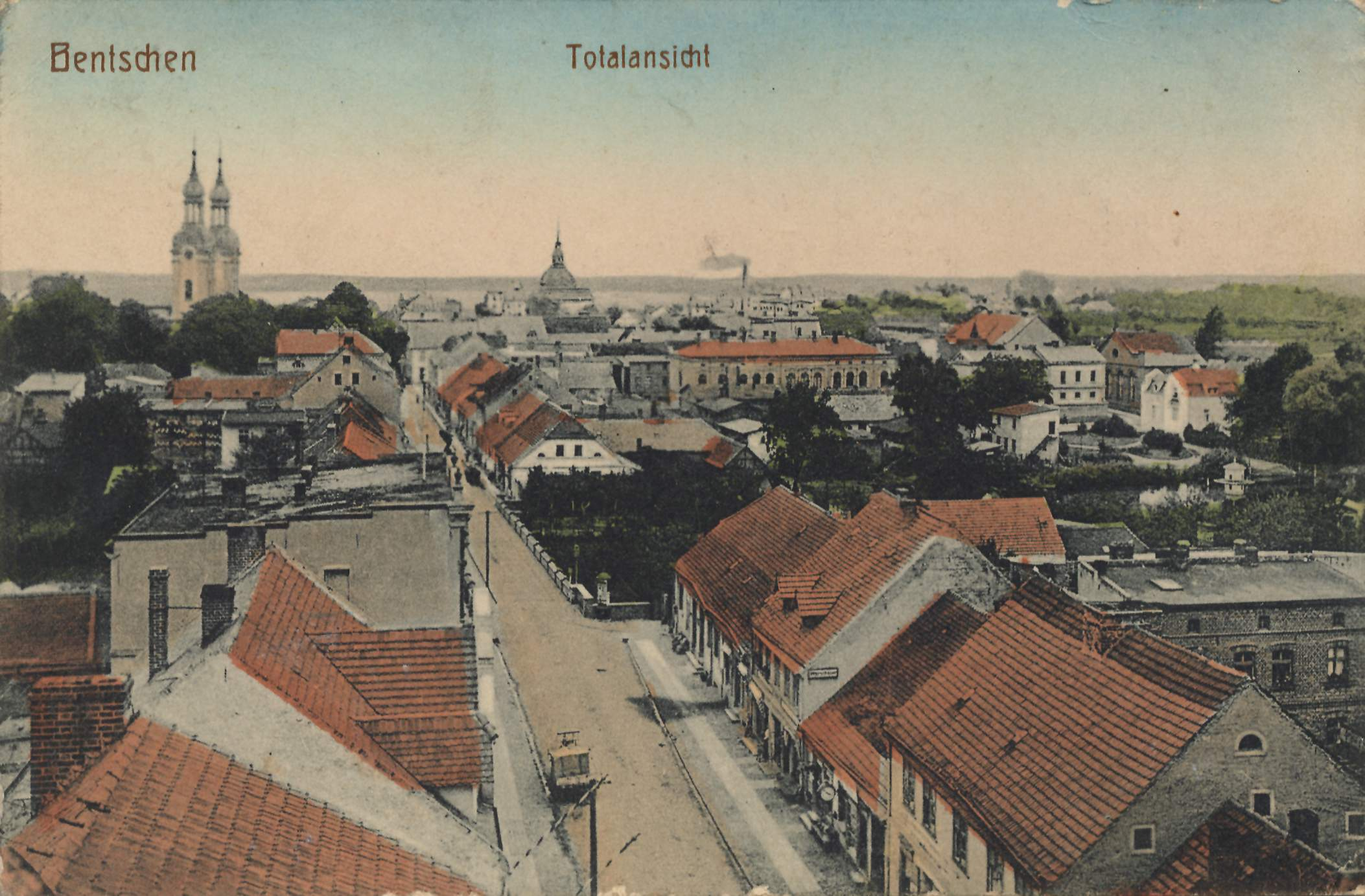 Stadtansicht